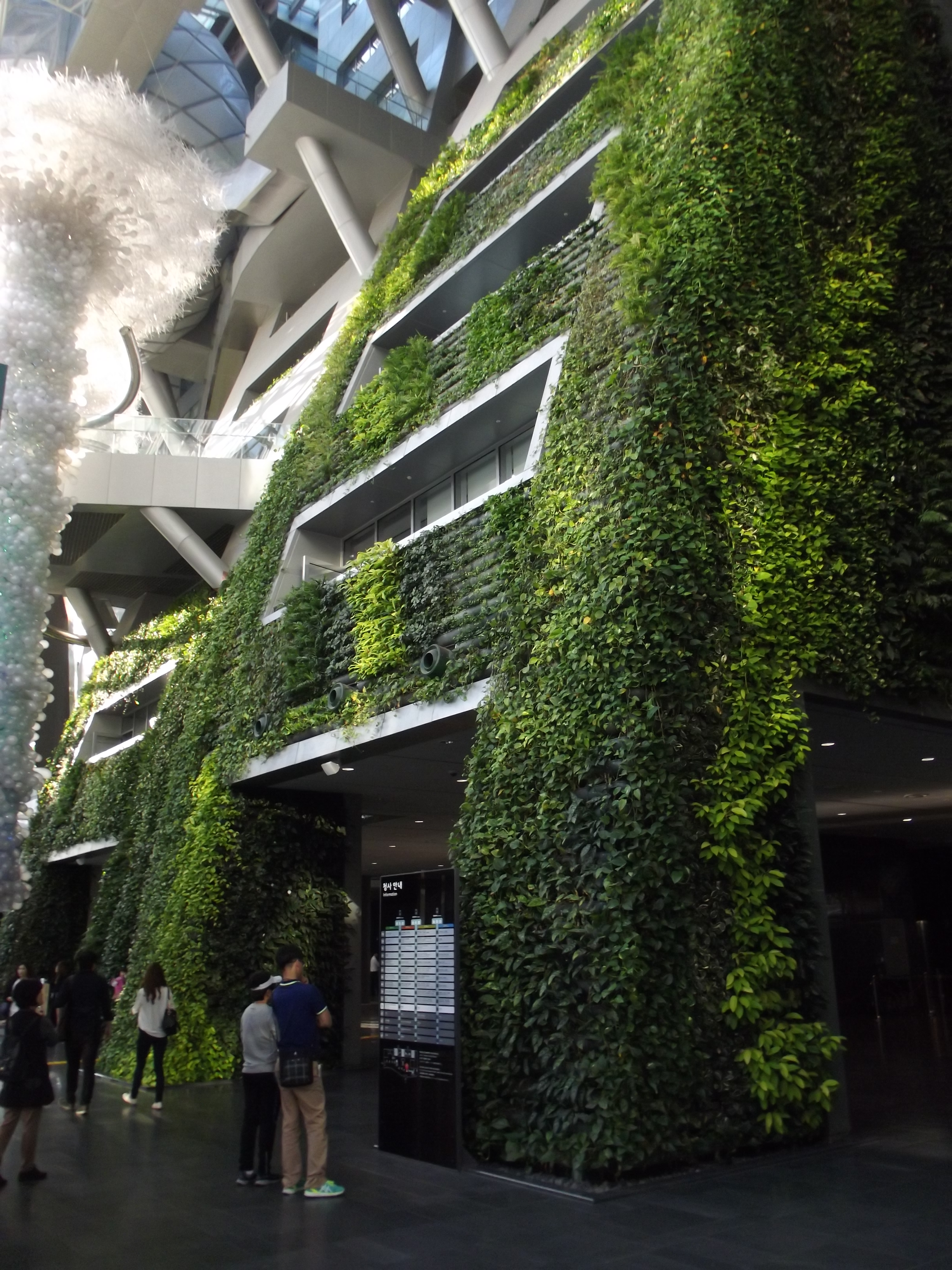 Groene muur in het stadshuis van Seoul